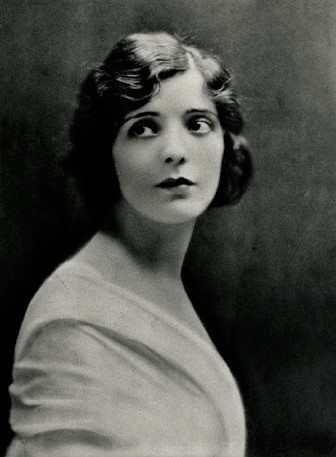 Alma Rubens